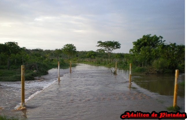 Rio Do Peixe